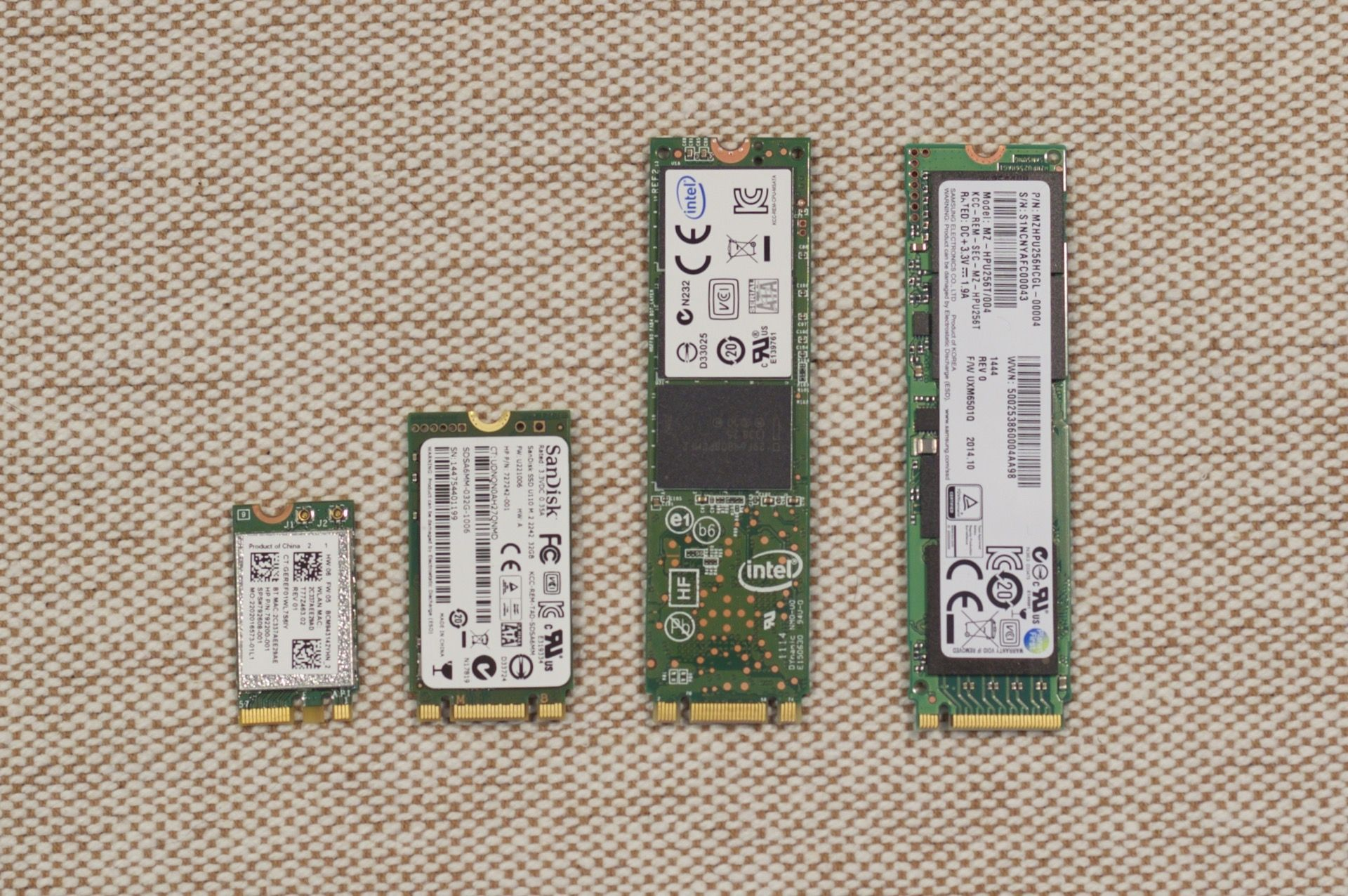 左から、mSATA（と同一形状のMini PCI Express 無線LANカード）、 M.2 SATA (2242) 、M.2 SATA (2280)、M.2 PCIe2.0x4接続SATA (2280) のSSD。